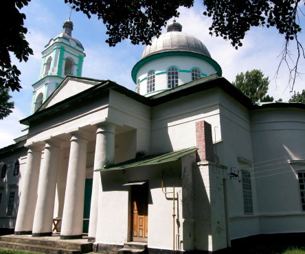 Воскресенська церква в м.Остер. Пам"ятка архітектури 18